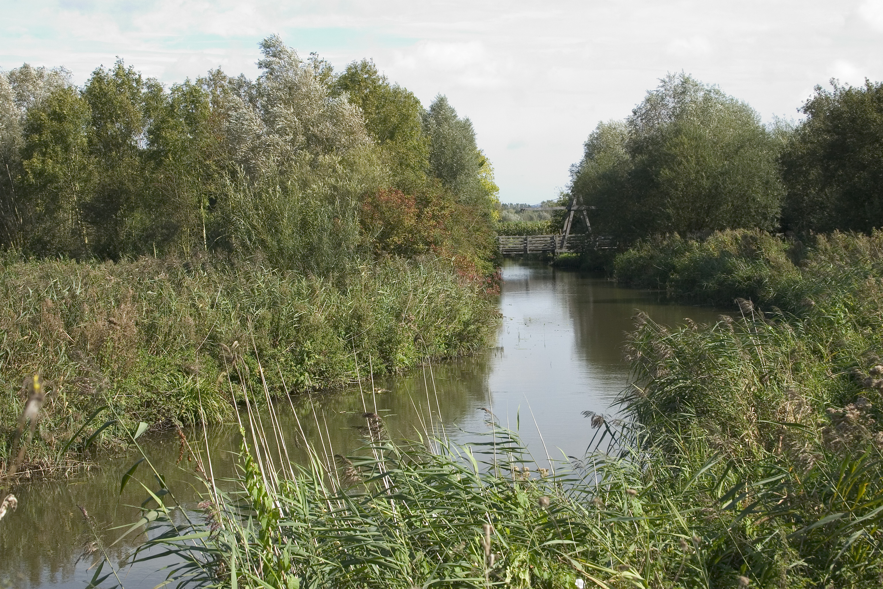 Clairamrais dans la réserve naturelle du Romelaere